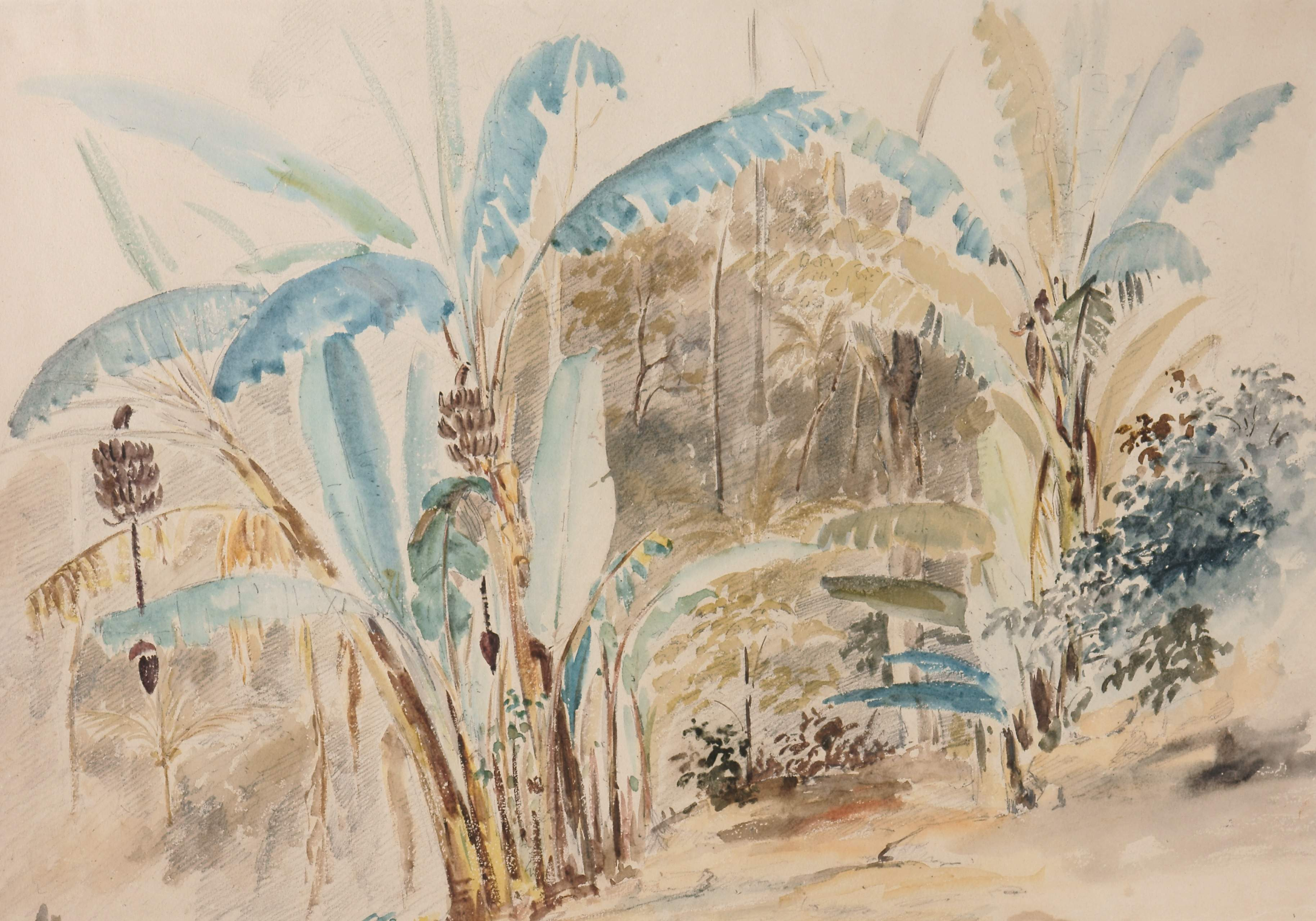 Camille Pissarro: Bananeros. 47 x 33 cm. (Sin Fecha). Colección Banco Central de Venezuela Comprada en Hammer Galleries de New York en junio de 1965.